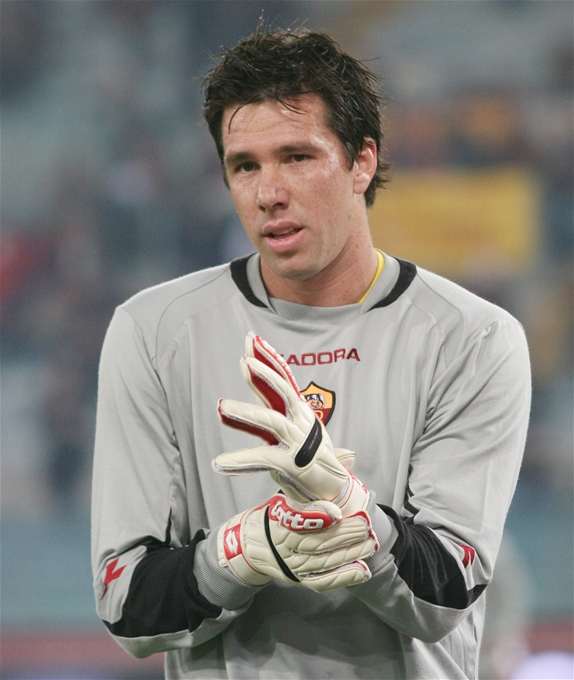 Doniéber Alexander Marangon "Doni"